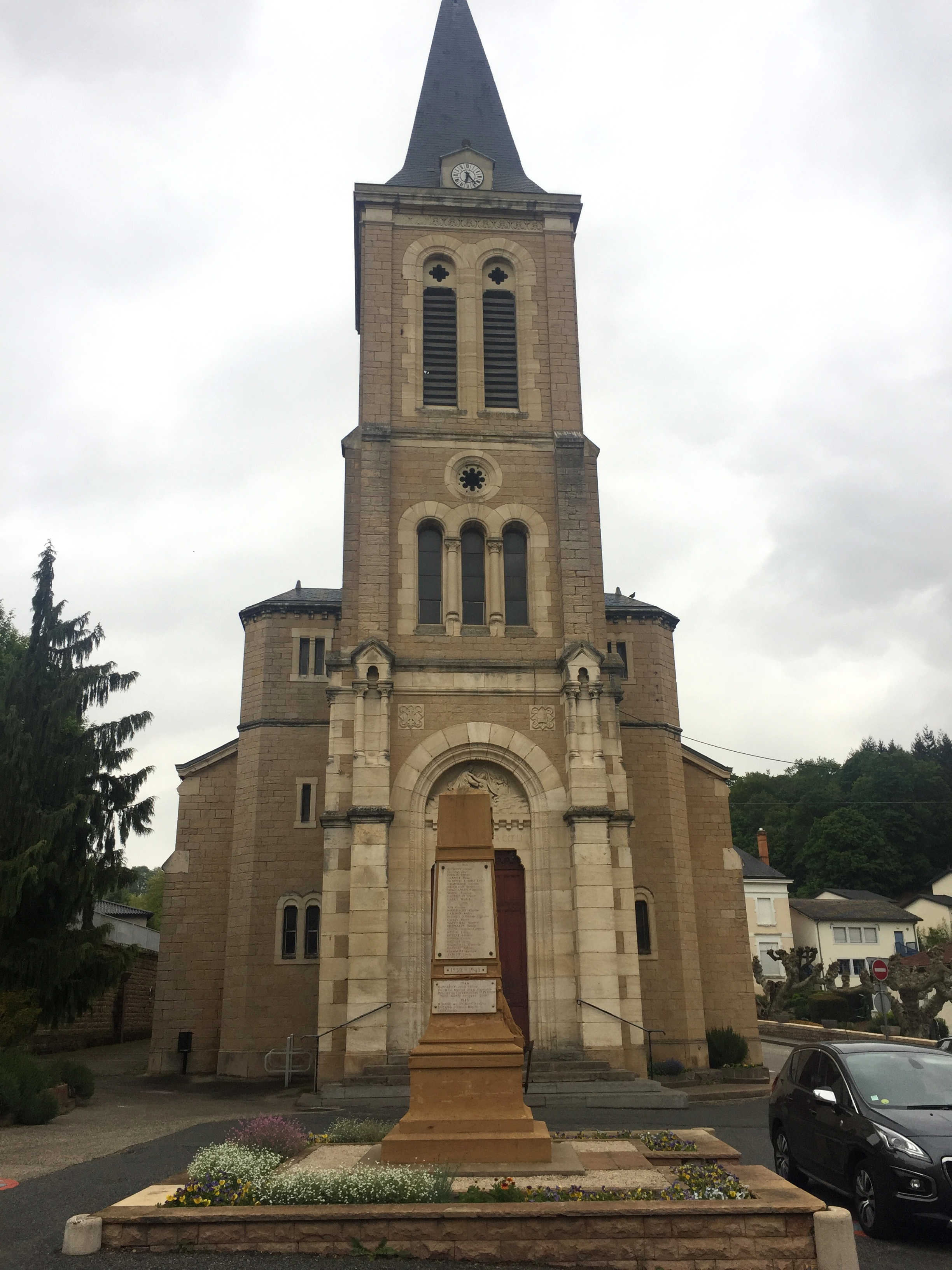 Image de Reyrieux, Ain, France en avril 2017.